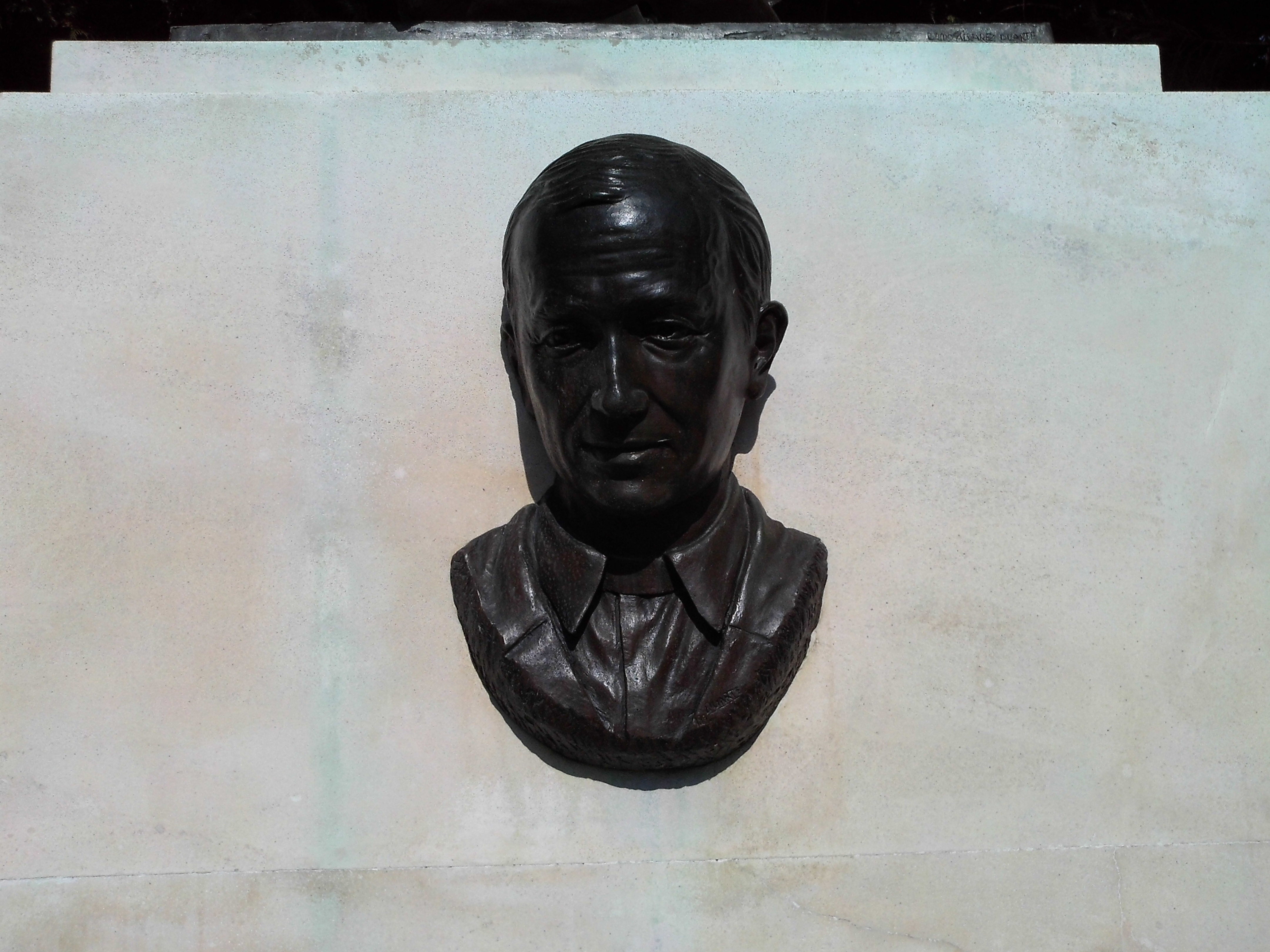 Busto de Serafín Madrid. Sevilla, Andalucía, España.